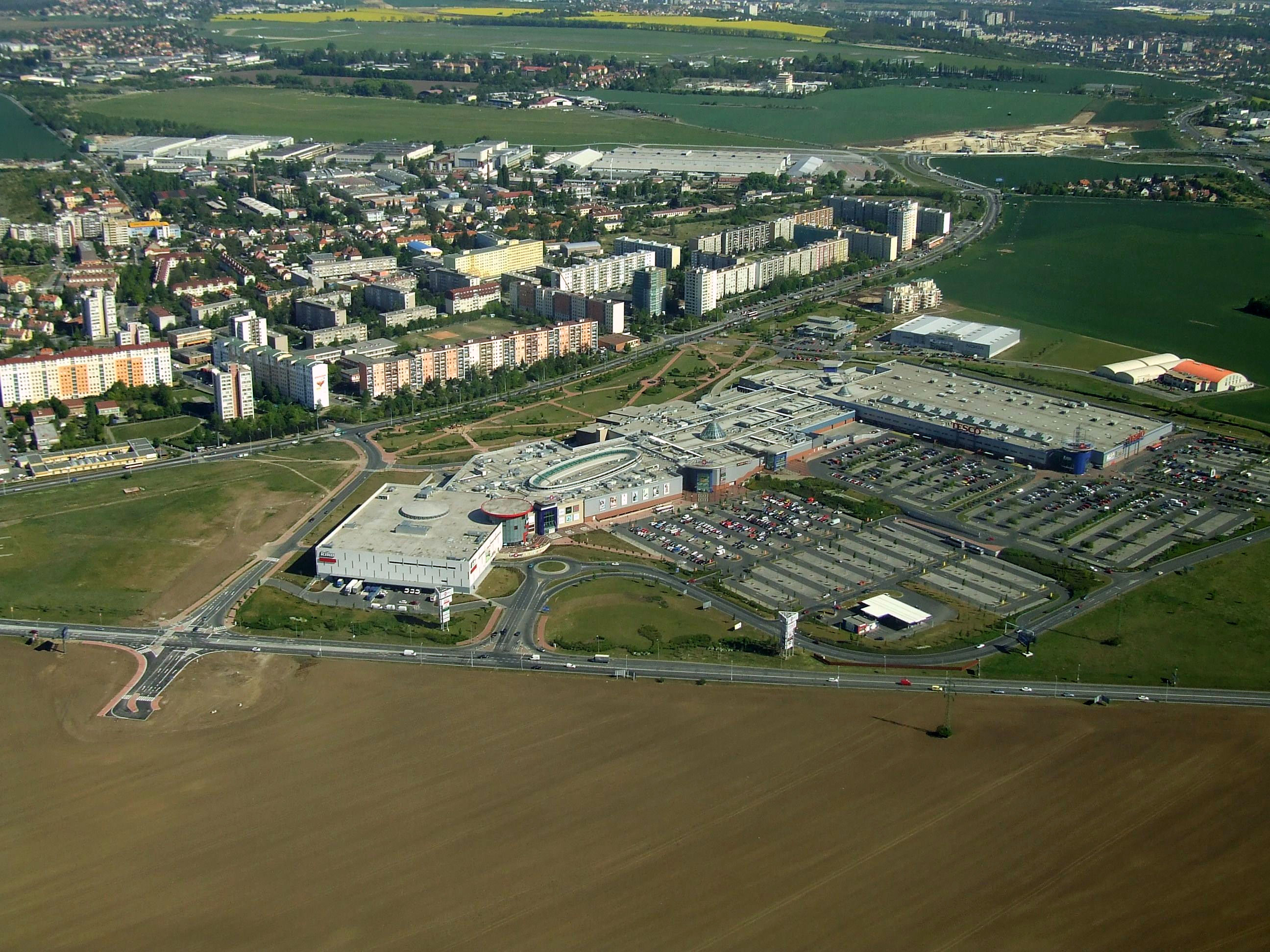 Městská část Praha - Letňany